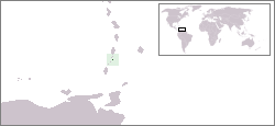 Description:Carte de localisation de l'île de Moustique, Saint-Vincent-et-les Grenadines Auteur:Rémih à partir d'une carte du CIA WorldFactBook